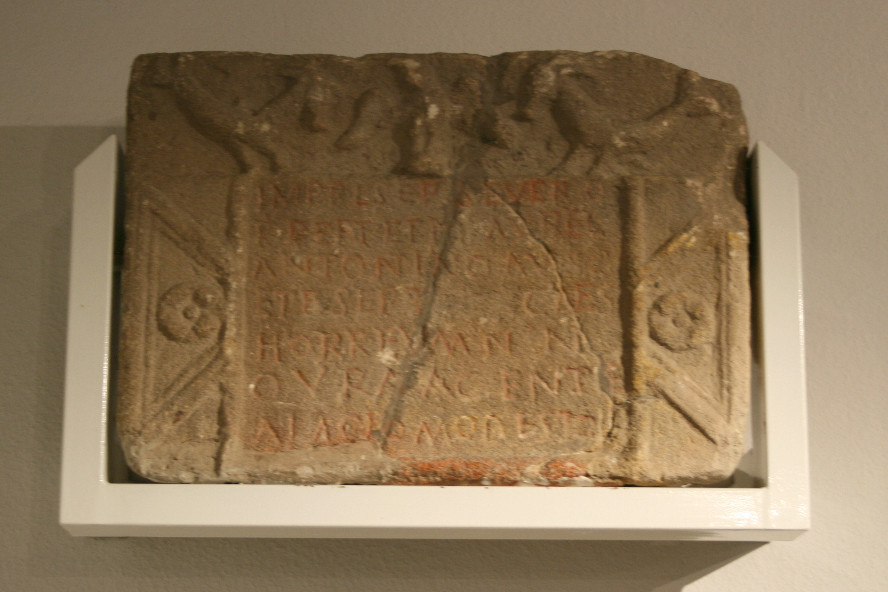 Bauinschrift vom horreum des Kastell Kapersburg im Wetterau-Museum in Friedberg (CIL XIII, 07441). Mit freundlicher Genehmigung des Museums.